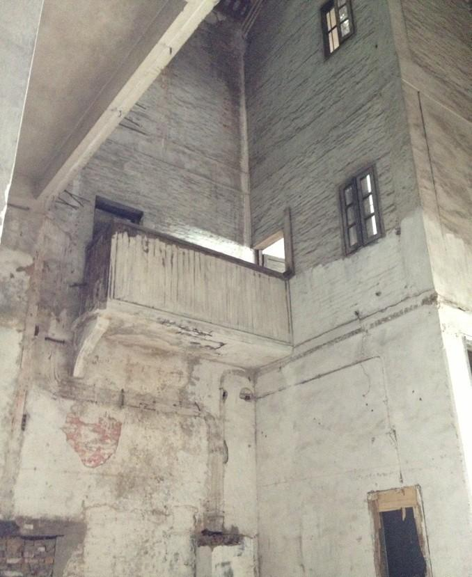 粵語: 鳳凰崗 誠志倉內部